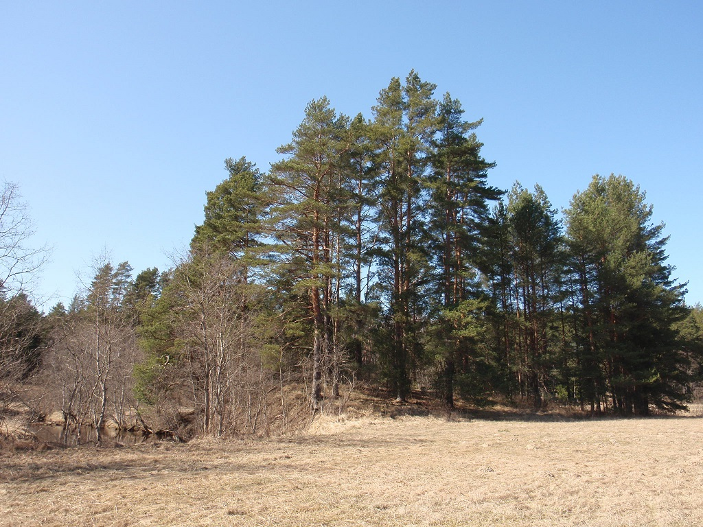 Eoste Ristimägi